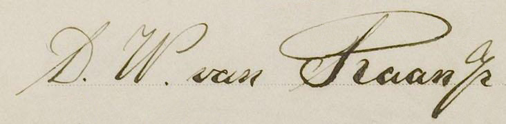 Подпись Вима ван Рана